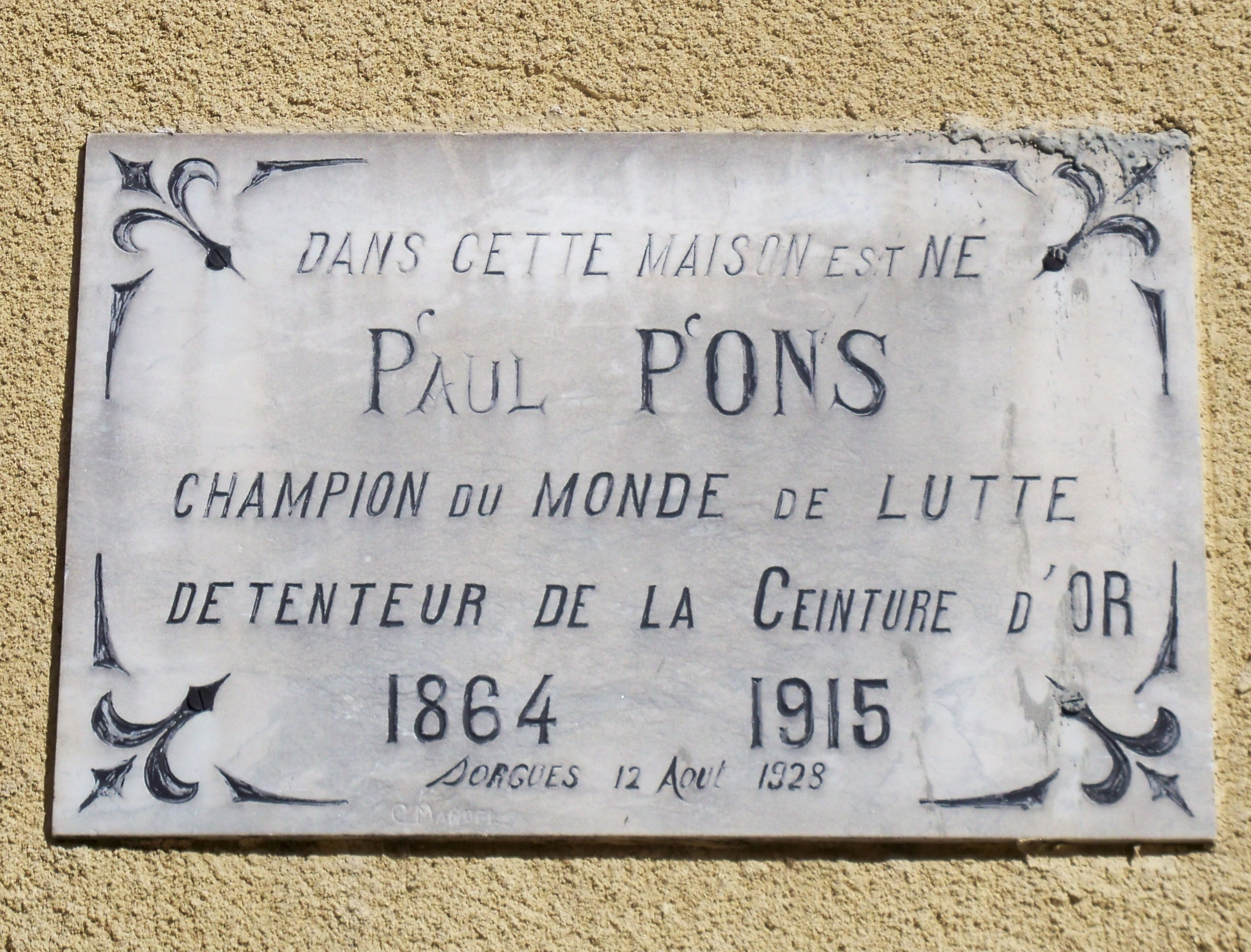 plaque maison natale de Paul Pons à Sorgues (84)